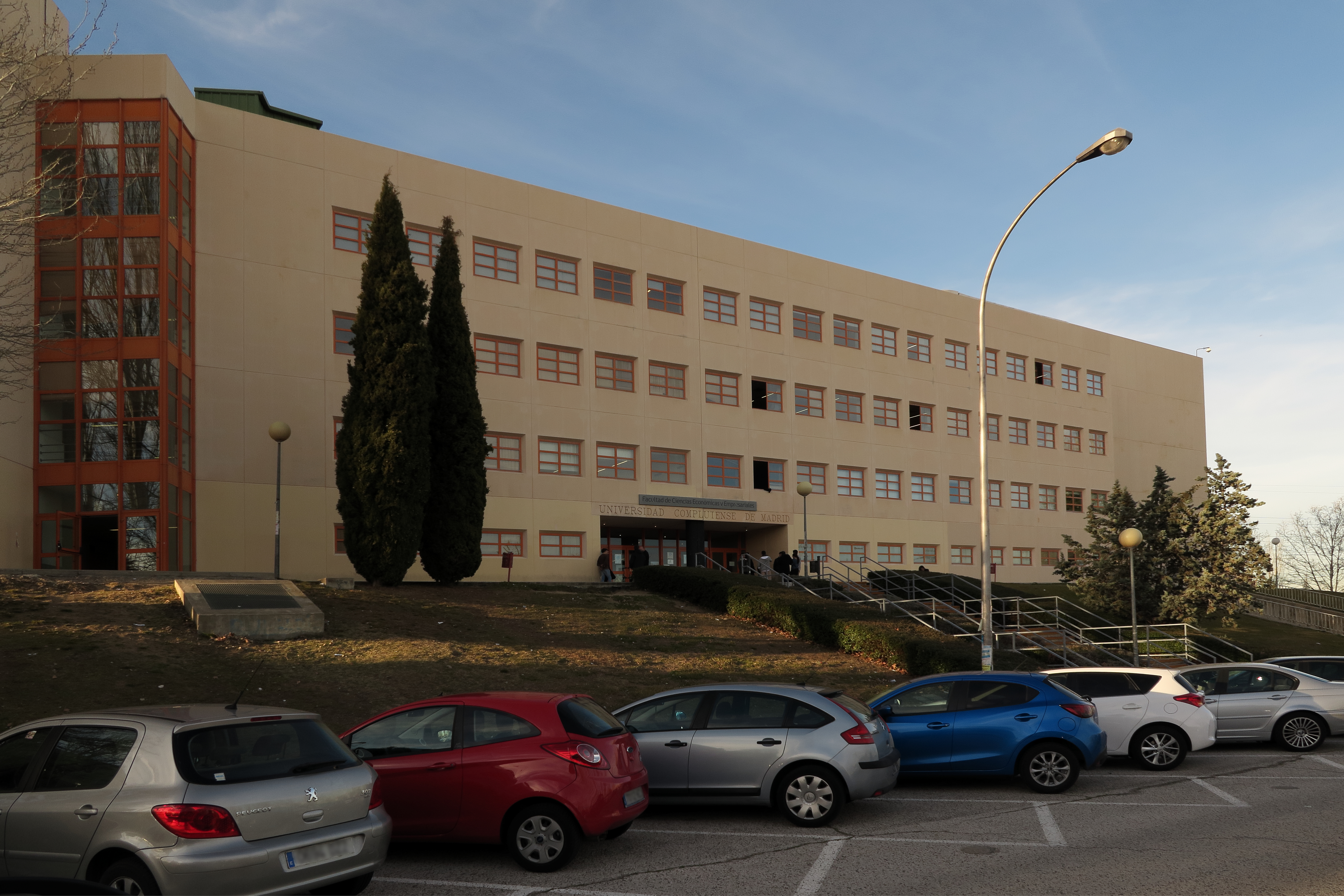 Facultad de Ciencias Económicas y Empresariales (Edificio Aulario)